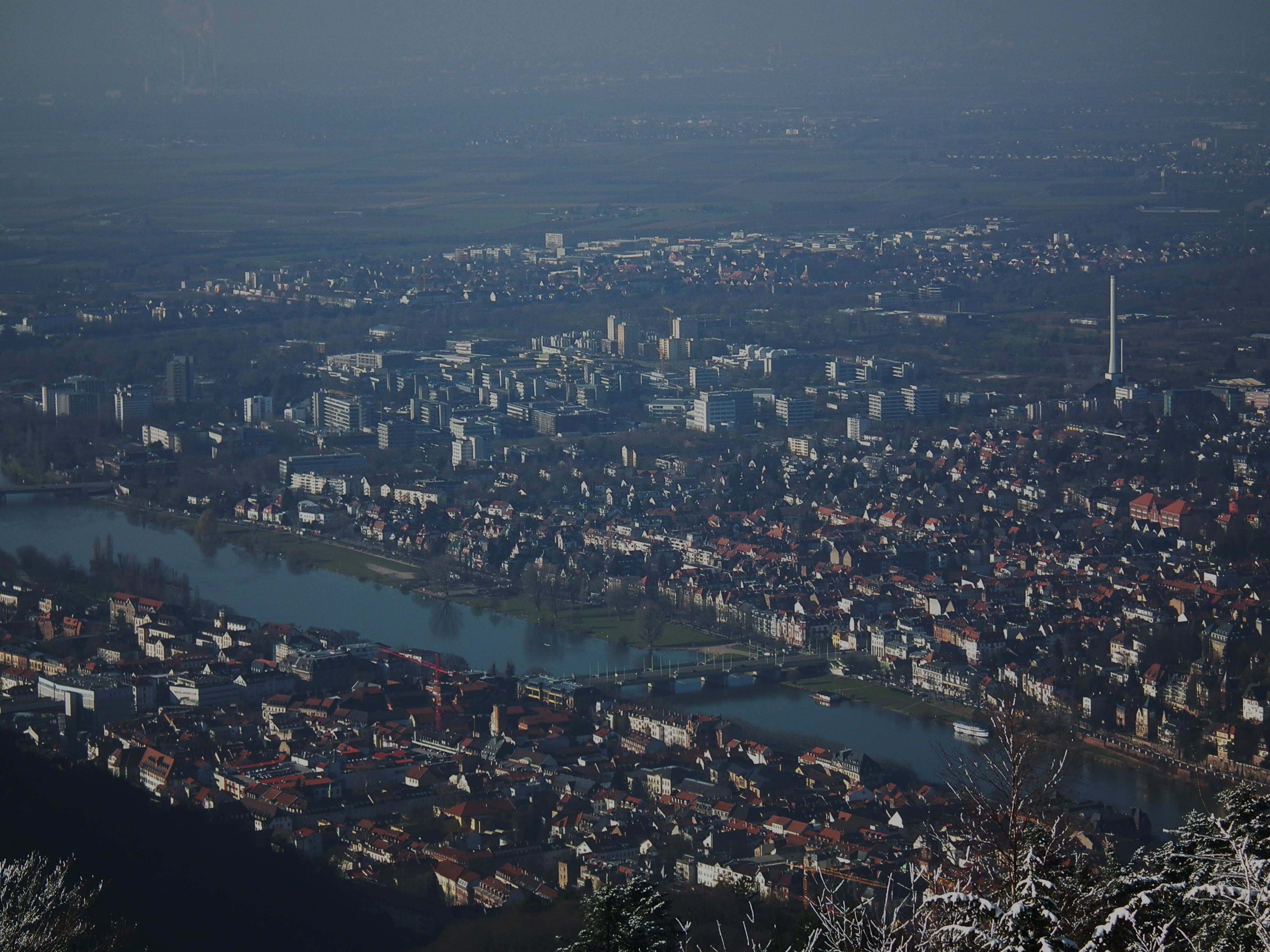 Heidelberger Altstadt, der Neckar und der Stadtteil Neuenheim, fotografiert vom Königstuhl (Baden-Württemberg, Deutschland)